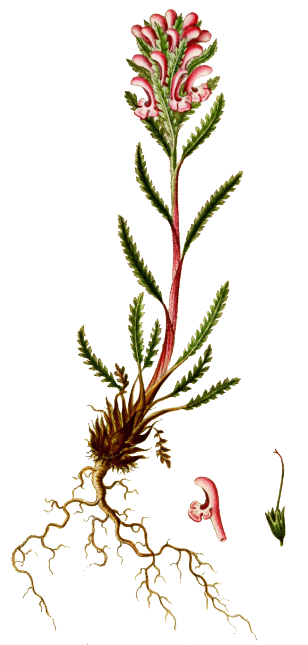 Pedicularis hirsuta L.